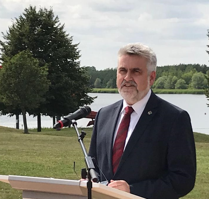 Prof. Dr. Armin Willingmann (2018)